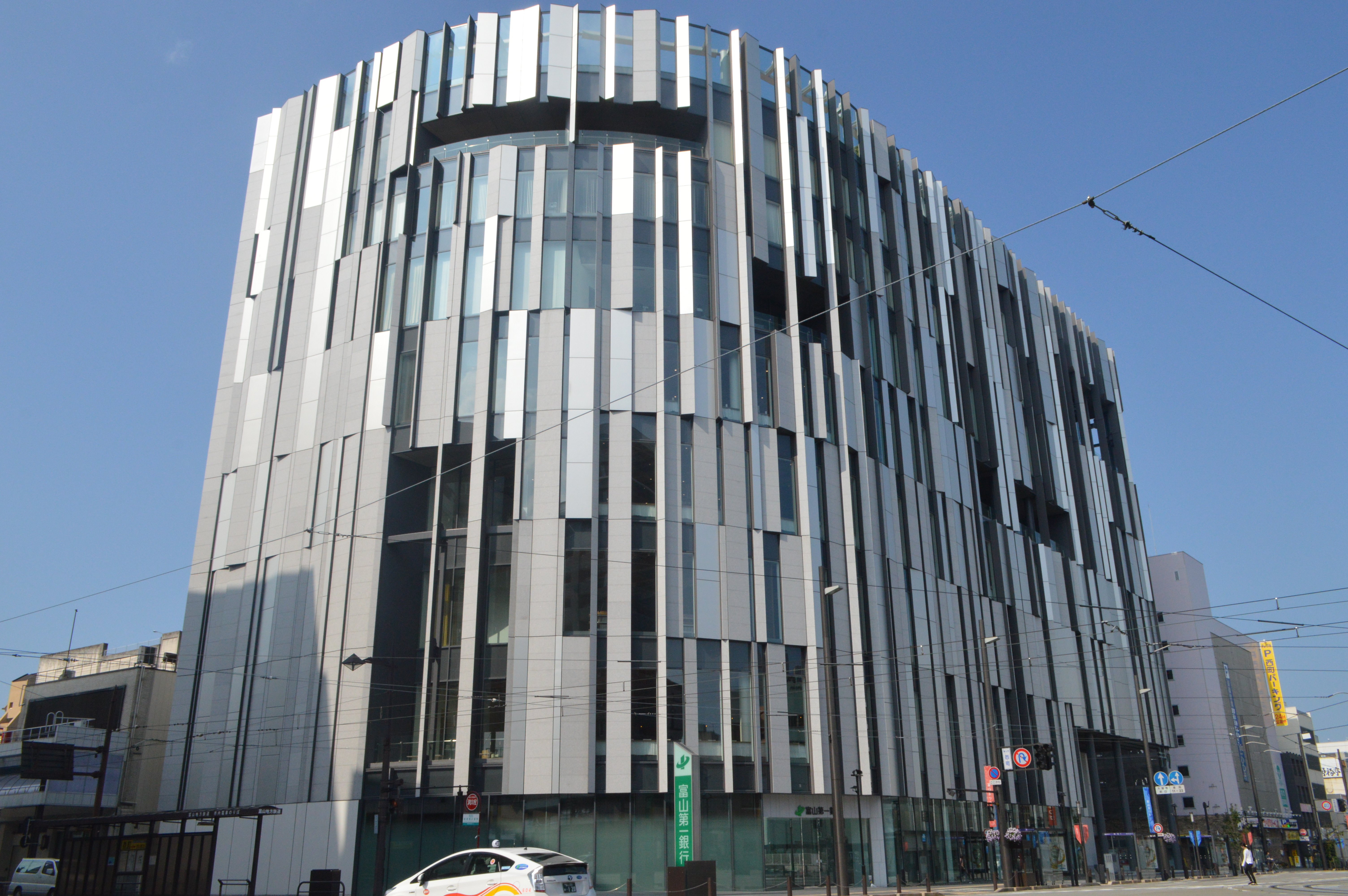 TOYAMAキラリの外観。7月30日の9時ちょうど頃。